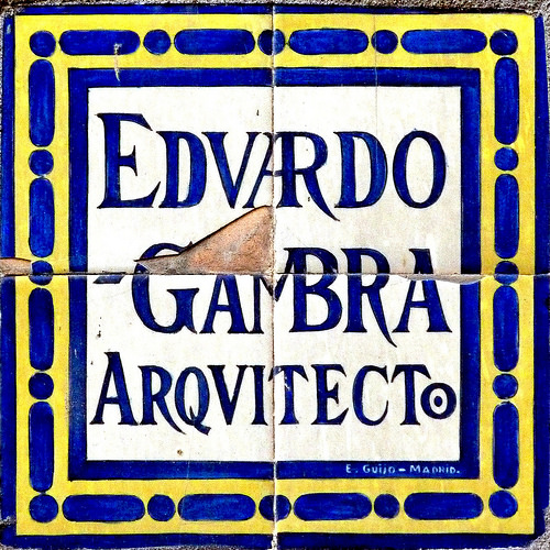 Azulejo con la inscripción de Eduardo Gambra Arquitecto, en Madrid, en la Casa Palacio del Conde de Cedillo, en la calle General Oraá.